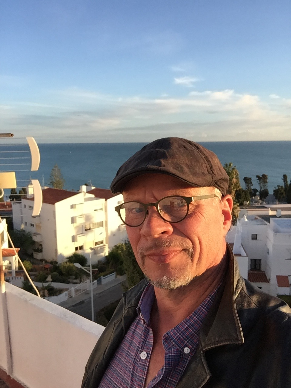 Juha Ruusuvuori katolla.